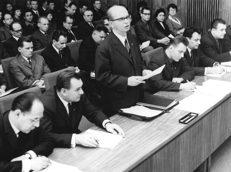 Zentralbild/Kohls 31.3.1967 Berlin: 32. Sitzung des Staatsrates der DDR Am 31. März 1967 trat unter dem Vorsitz des Ersten Sekretärs Walter Ulbricht der Staatsrat der Deutschen Demokratischen Republik zu seiner Beratung über die Grundsätze der sozialistischen Jungendpolitik zusammen. Am Vorabend des VII. Parteitages der SED und wenige Wochen vor dem VIII. Parlament der FDJ widmet sich die Staatsführung einem bedeutsamen Problem der weiteren gesellschaftlichen Entwicklung der DDR bis zur Vollendung des Sozialismus. Unser Bild zeigt den Stellvertreter des Vorsitzenden des Ministerrates Alexander Abusch bei seiner Ansprache. 1.v.l. der Minister für Kultur der DDR, Klaus Gysi, neben ihm Dr. Werner Boyde, Stellvertreter des Produktionsleiter des Landwirtschaftsrates. 1.v.r. neben Absuch Siegfried Lorenz, Vorsitzender des Jugendausschusses der Volkskammer, neben ihm Alfred B. Neumann, Staatssekretär und Vorsitzender des Staatlichen Komitees für Körperkultur und Sport.